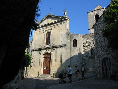 Cathédrale Saint-Quenin, ville haute de Vaison-la-Romaine